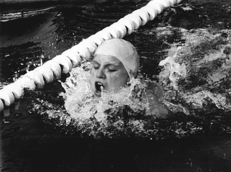 Brigitte Schuchardt Zentralbild Liebers 9-7-70-Brandenburg: XXI. DDR-Meisterschaften im Sportschwimmen im neu eröffneten Volksbad von Brandenburg-Havel (am 8.7.70)-Brigitte Schuchardt (SC Turbine Erfurt) strebt mit letztem Einsatz im Finale über 200 m Brust dem Meistertitel entgegen. Die 15jährige Erfurterin verbesserte mit 2:42,1 min ihre eigene DDR-Rekordleistung um 2,4 s und schob sich an die neunte Stelle der ewigen Weltbestenliste.